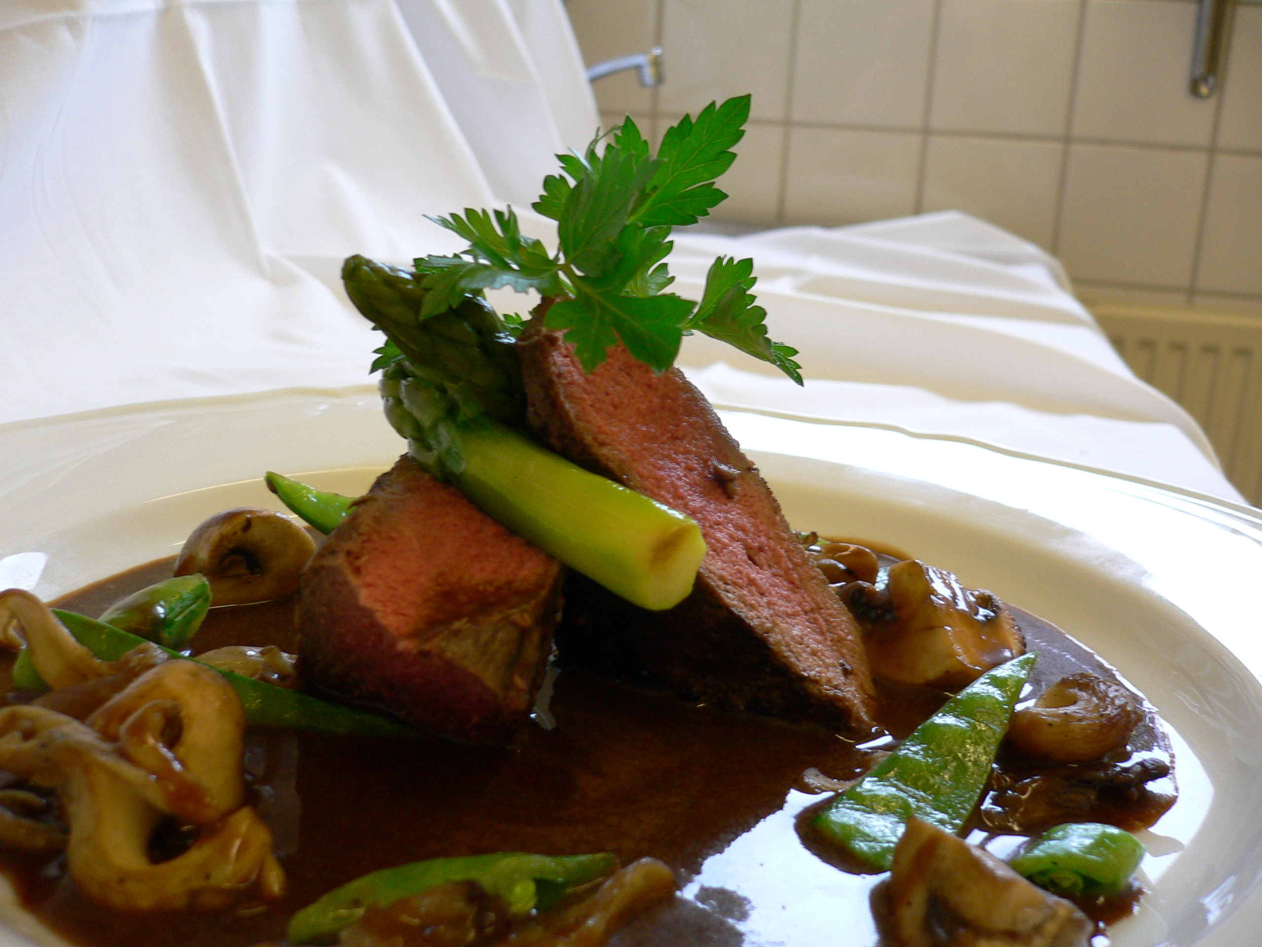 Runö park Hotell & Konferens: Middag